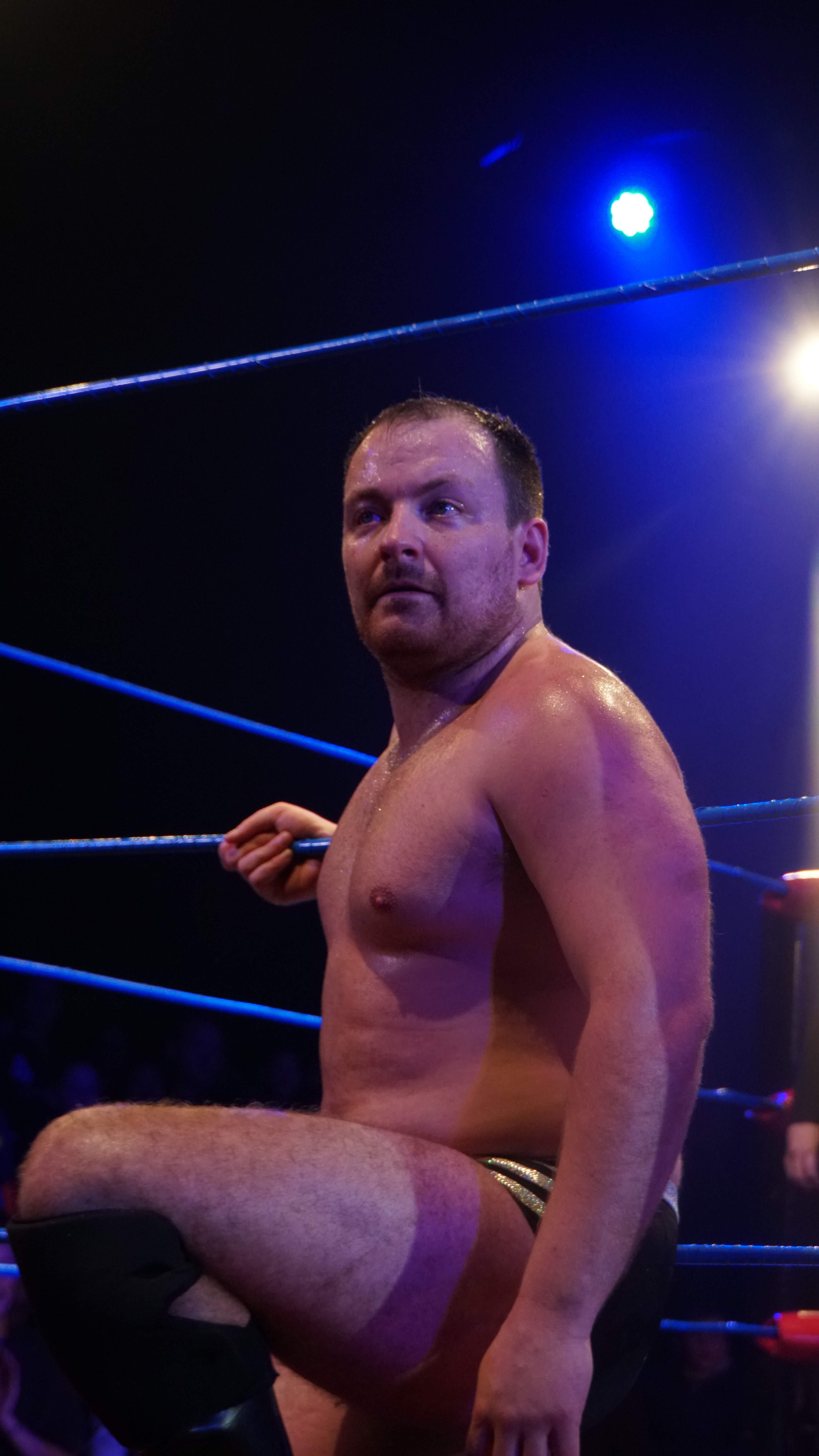 Flemish Wrestling Force - Wrestlefest 3 - Michael Dante Vs Doug Williams, Phil Boyd Michael Dante def. (Pin) Doug Williams, Phil Boyd (c) Type of match : Triple Threat Match For : FWF World Title match (Title Change) ( Description: Pro Wrestling keert terug naar de Werft. Op zaterdag 20 januari keert Flemish Wrestling Force terug naar de Werft met een spetterende show vol actie en spektakel. Mannen en vrouwen van over heel Europa reizen af naar Geel om het beste worstelen, dat ooit in Belgie gezien is, te tonen. De blikvangers van Wrestlefest 3 zijn ongetwijfeld Doug Williams (UK) en Jordan Devlin (IR) . De Britse spierbundel Doug Williams behoort tot de absolute wereldtop. Hij is een voormalige TNA en ROH ster. Binnen TNA is hij een voormalig TNA X-Division Champion en TNA Tag Team Champion. Binnnen ROH droeg hij de ROH Pure Wrestling kampioenenriem. Jordan Devlin is een WWE ster uit Ierland die al op zijn twaalfde voor het eerst de ring in stapte. Hij werd opgeleid en wordt ondersteund door Finn Balor. Net zoals vele Ierse wrestlers hanteert hij een directe en fysiek intense wijze van worstelen. Ook de Fransman Lucas Di Leo was reeds actief binnen WWE NXT. Verder ontbreken de huidige FWF World Champion Phil Boyd (IR), FWF Queen of Extreme Katey Harvey (IR), FWF Tag Team Champions The Heroes Of Tomorrow en FWF Flemish Champion Gridlock niet. Tel daarbij nog de aanwezigheid van lokale helden en publiekslievelingen Rob Raw, Homeless Tom en Jungle Jill en je weet dat deze derde editie van Wrestlefest er eentje wordt om duimen en vingers bij af te likken! )